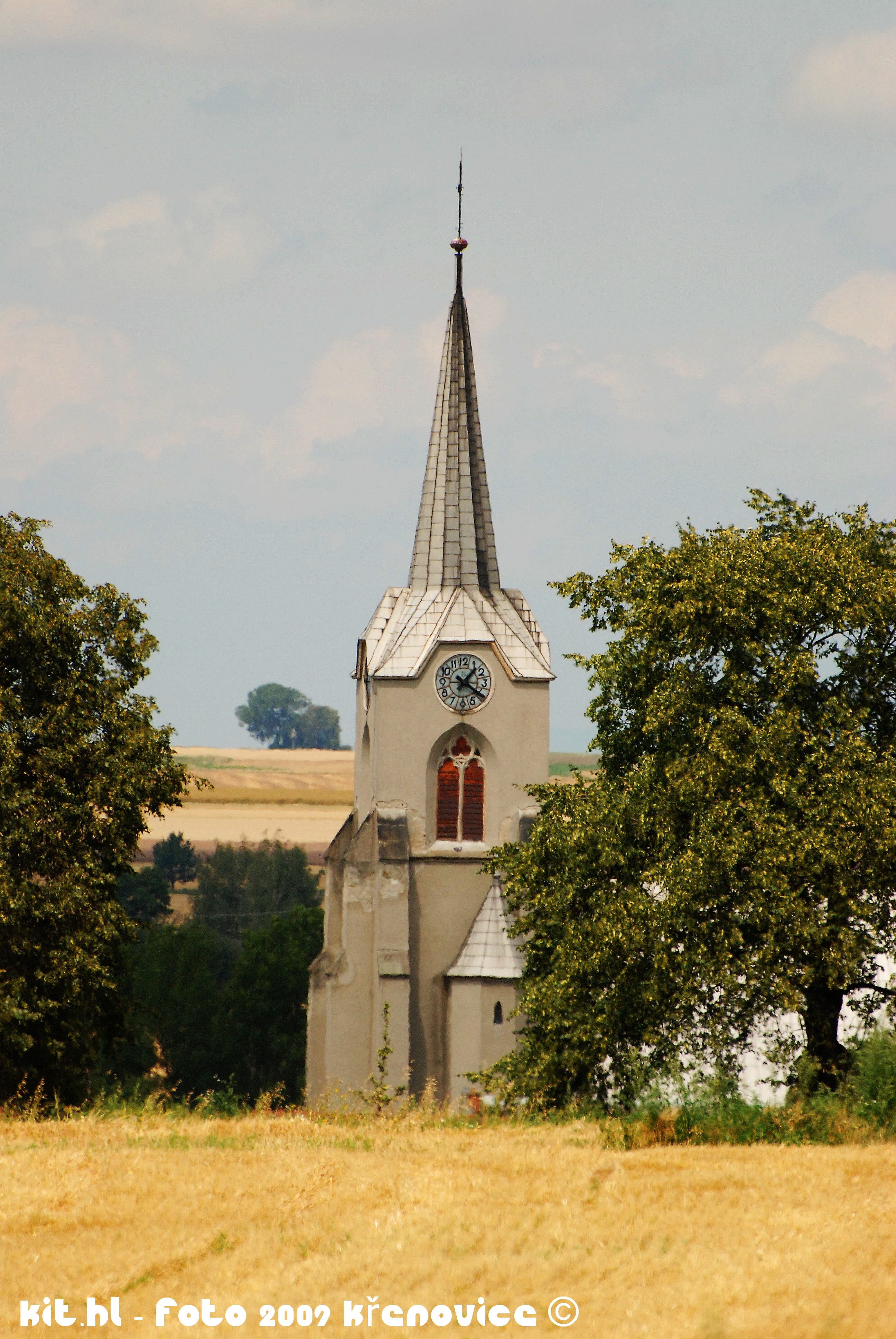 752 01 Křenovice, Czech Republic